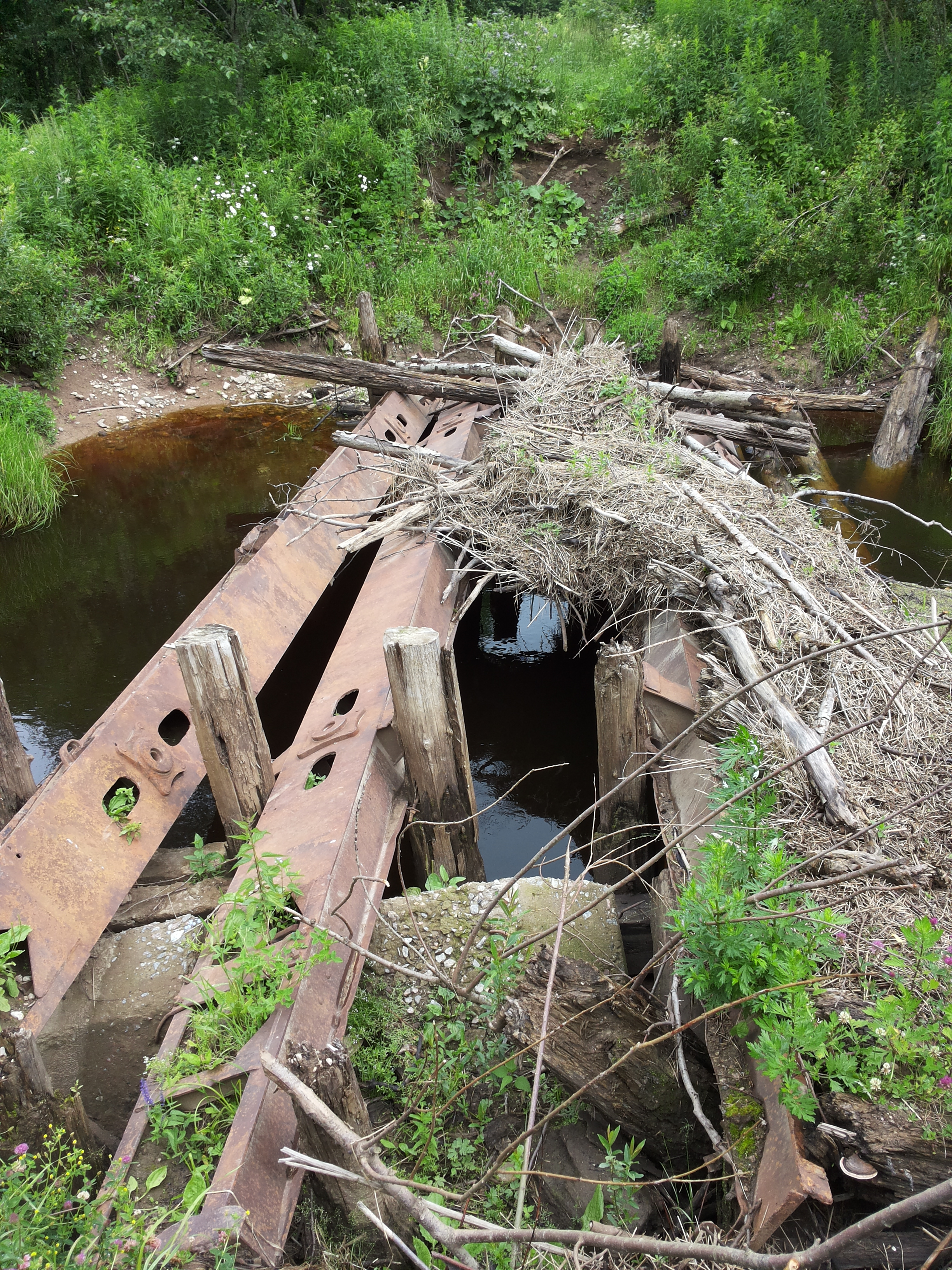 Равань, мост